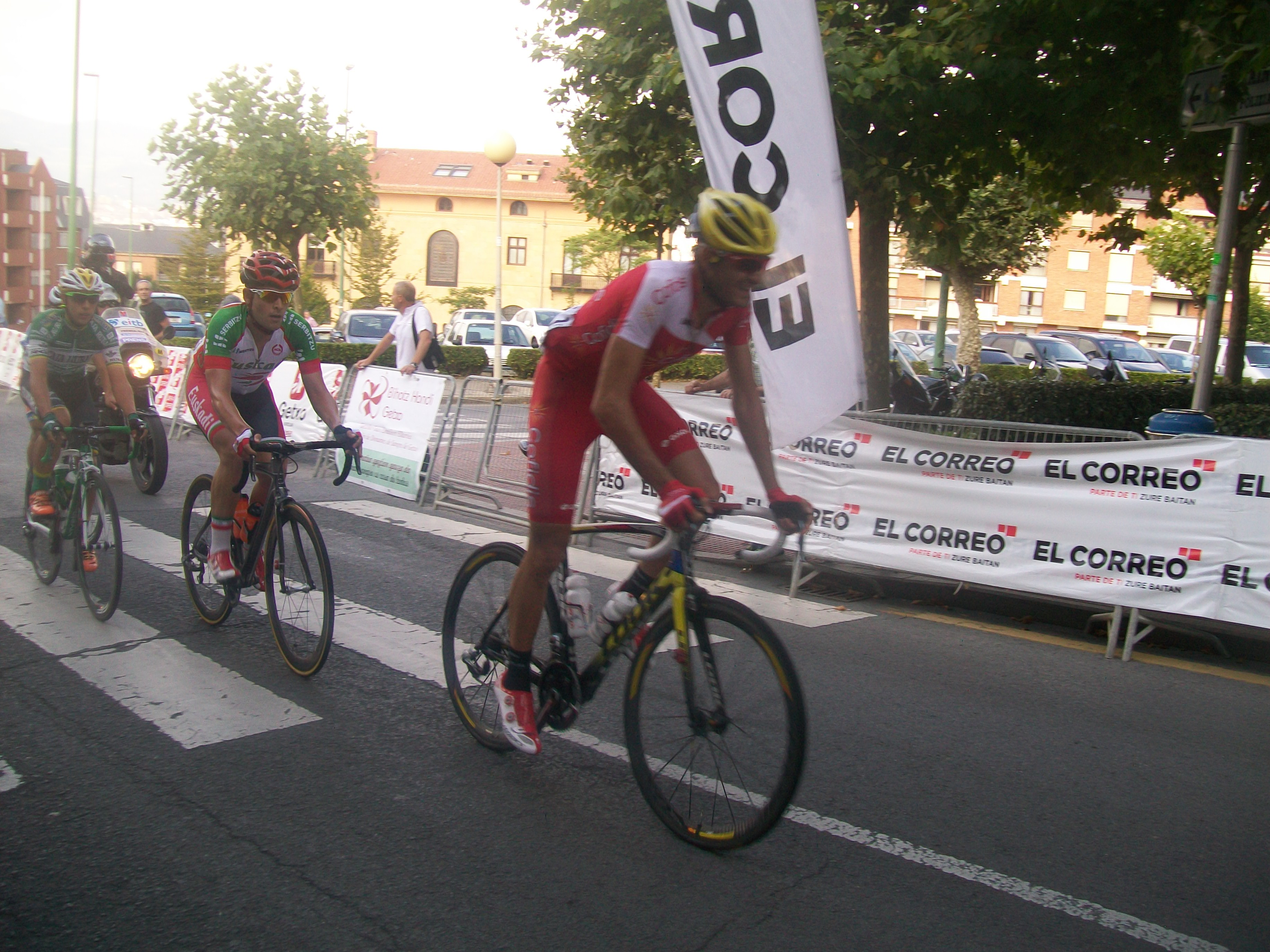 Escapados